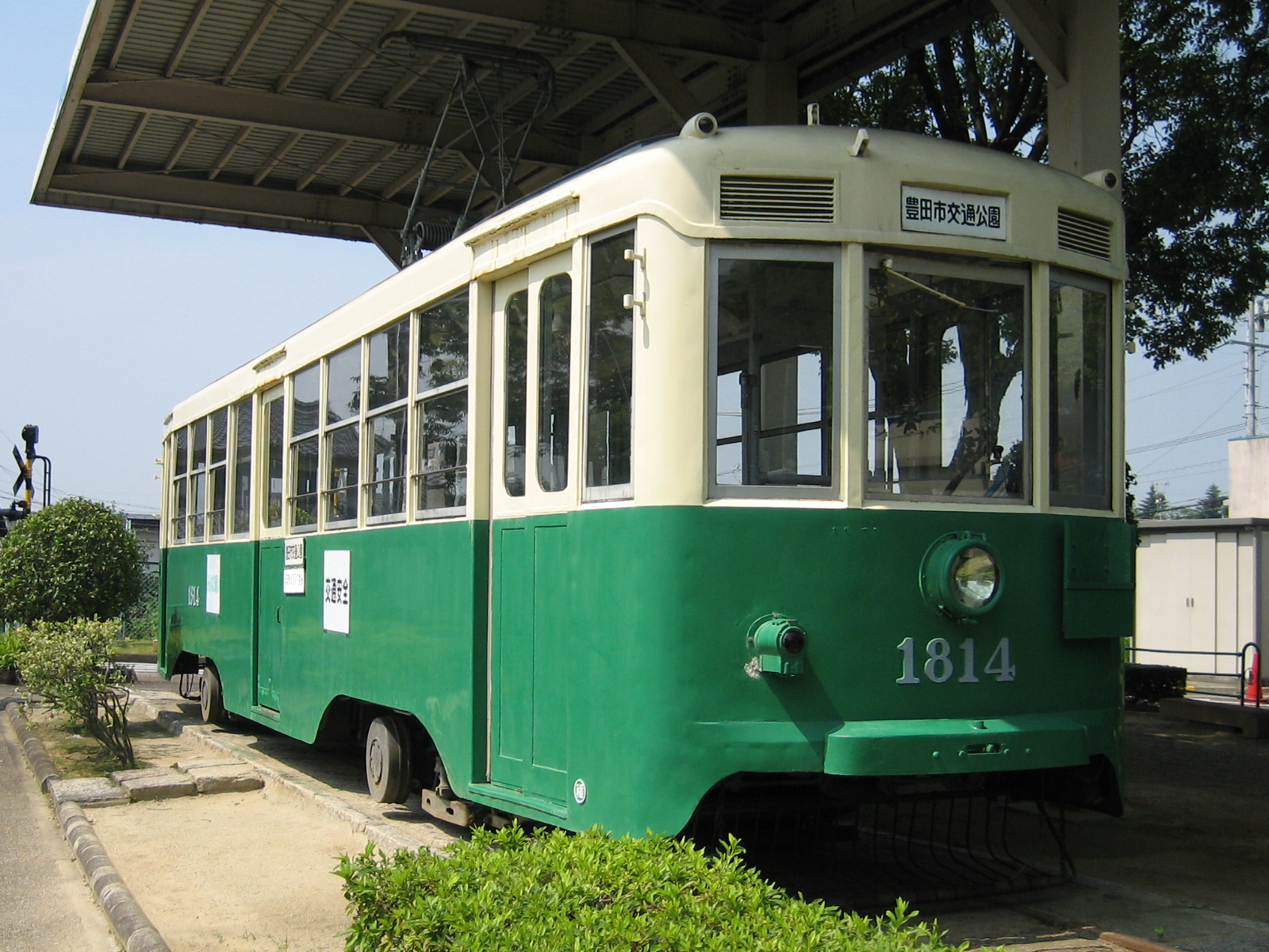 名古屋市交通局1800形電車の1814号。豊田市交通公園に保存されている。